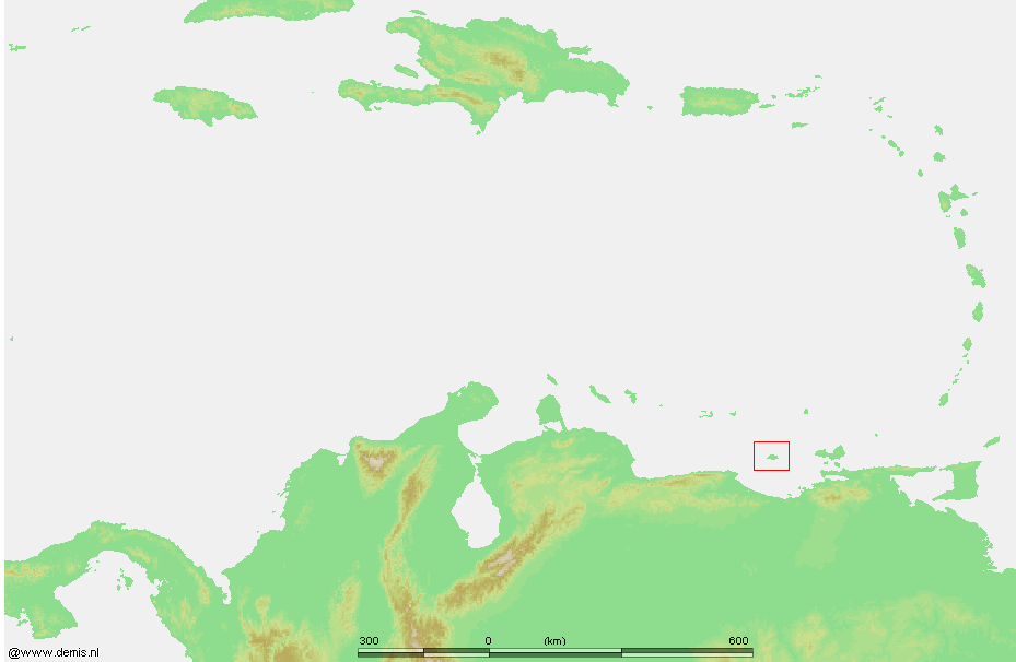 Caribbean - Tortuga.PNG